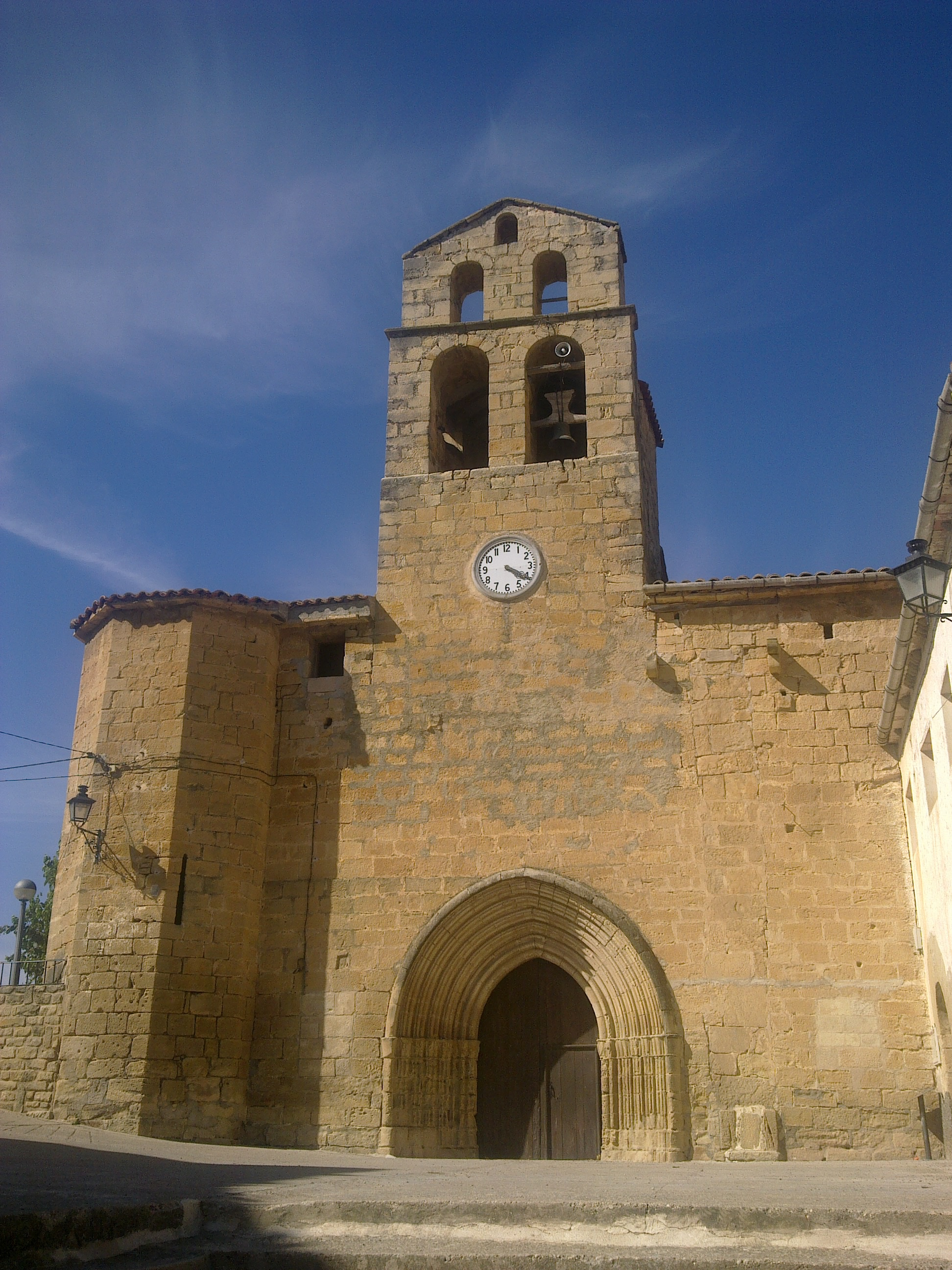 Església de l'Assumpció Arenys de Lledó